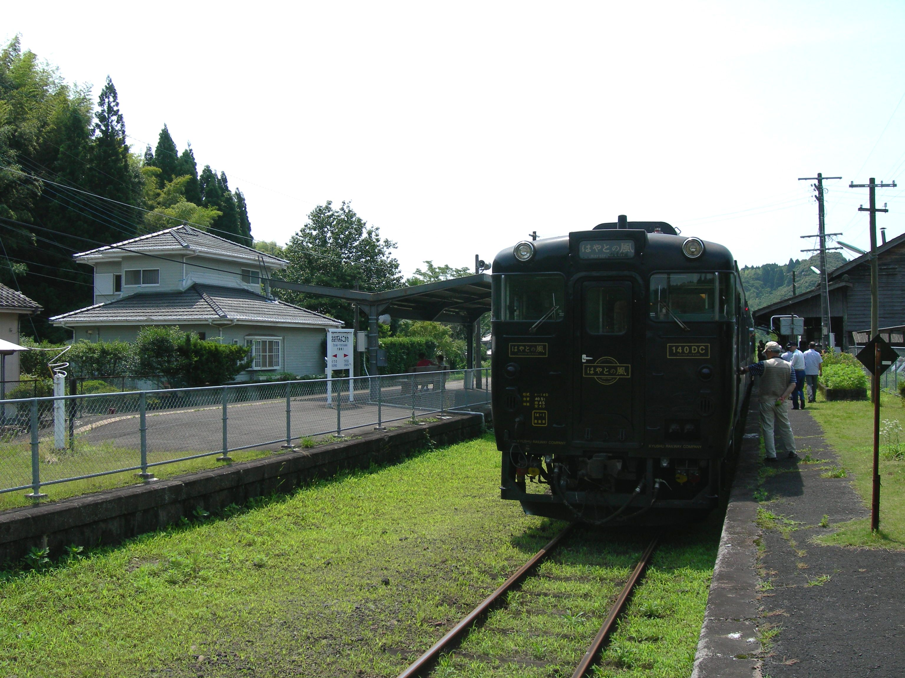 大隈横川駅プラットホーム